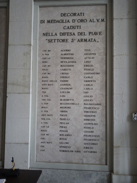 Lapide commemorativa Caduti Medaglia d'Oro sepolti presso il Sacrario Militare di Fagarè (Via Postumia Est, 89, 31048 San Biagio di Callalta TV)